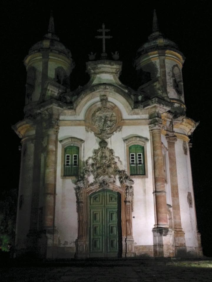 Detalhes em cantaria na fachada da Igreja de São Francisco de Assis, em Ouro Preto.